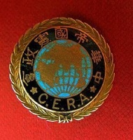 中华帝国宪政会所使用的徽章